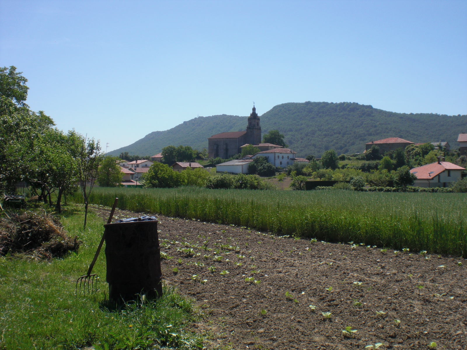 Ozetaren ikuspegia.